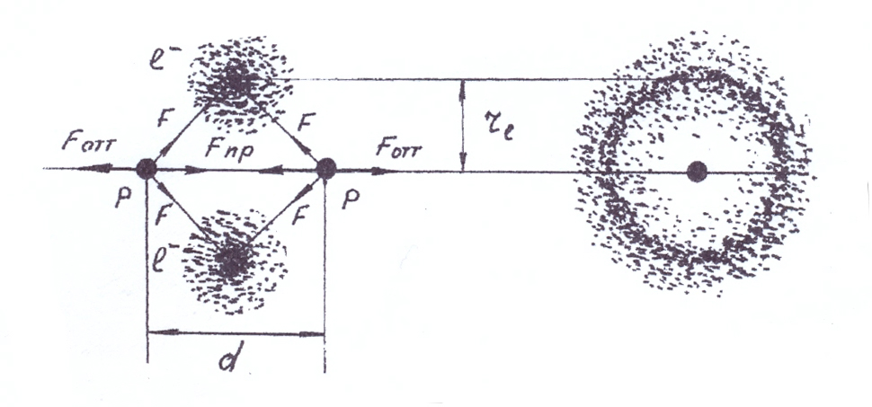 Тороидальное электронное облако